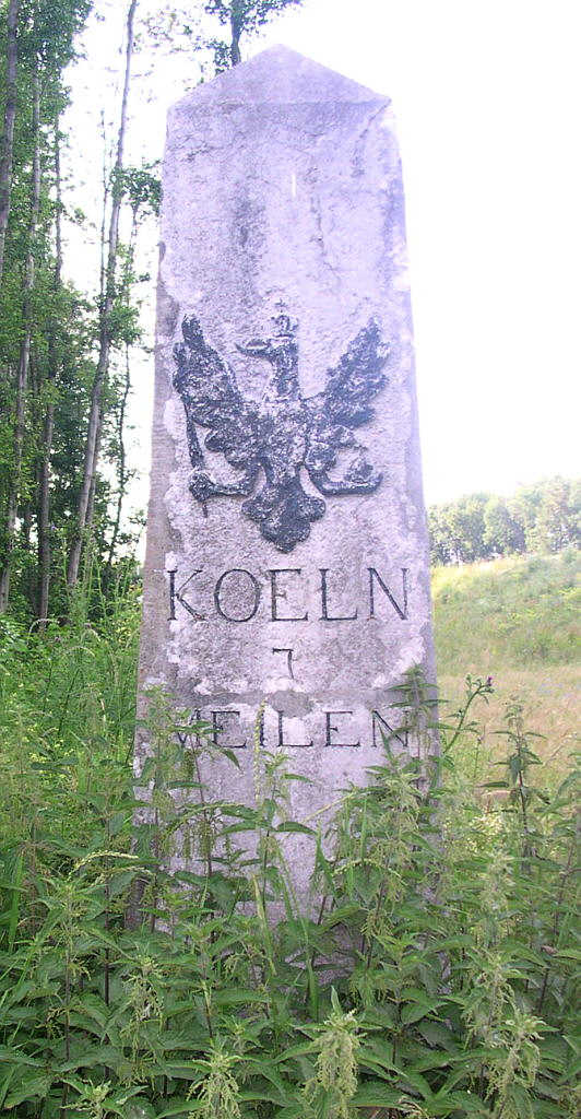 Meilenstein bei Alsdorf Hoengen